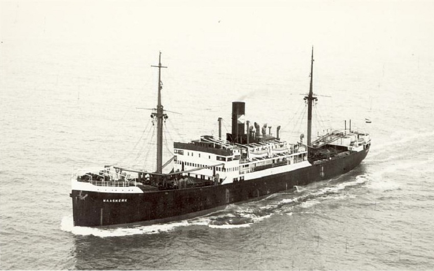 Das in Stettin gebaute niederländische Kombischiff MAASKERK für den Westafrika-Dienst